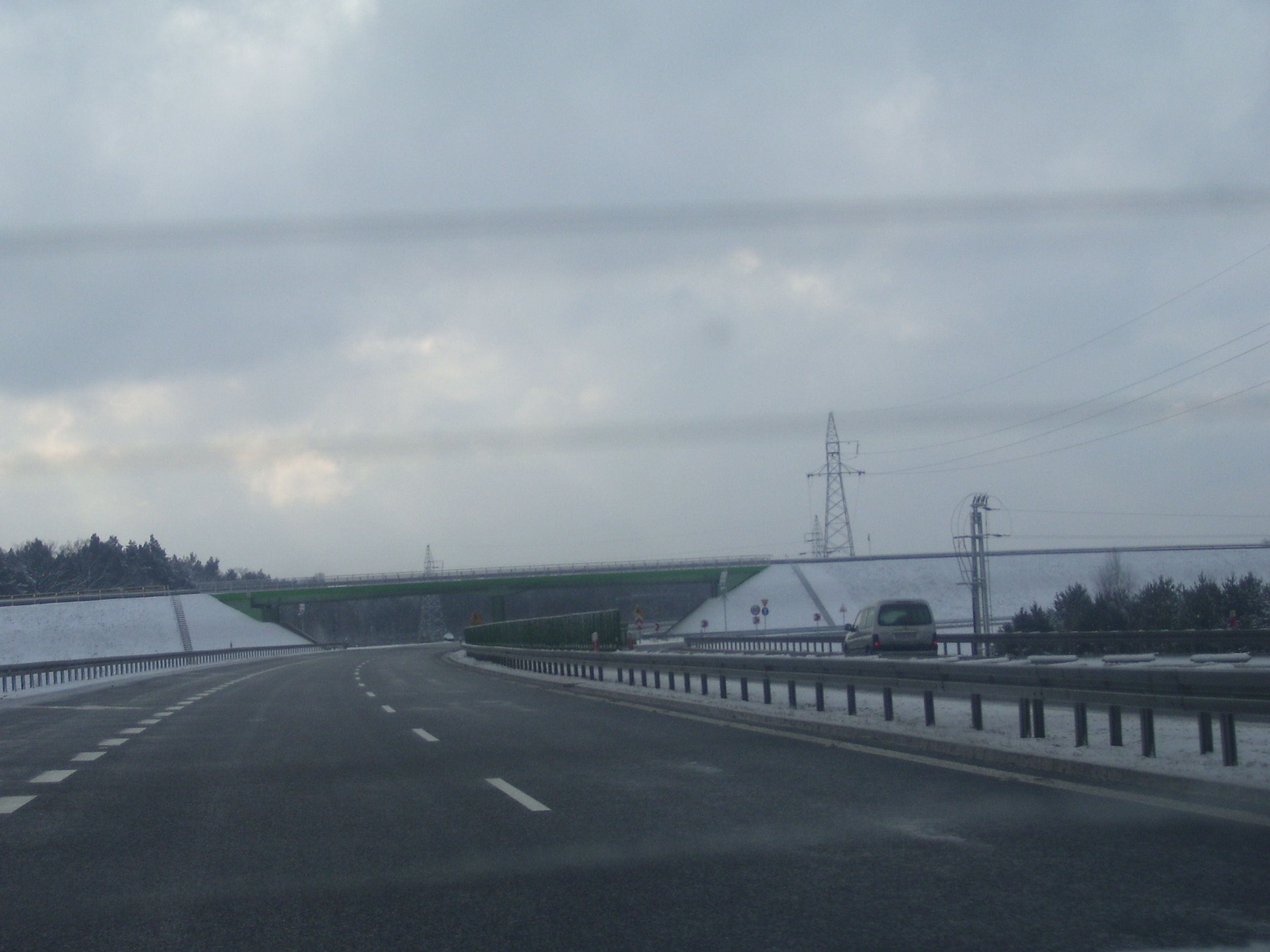 Obwodnica Wyszkowa